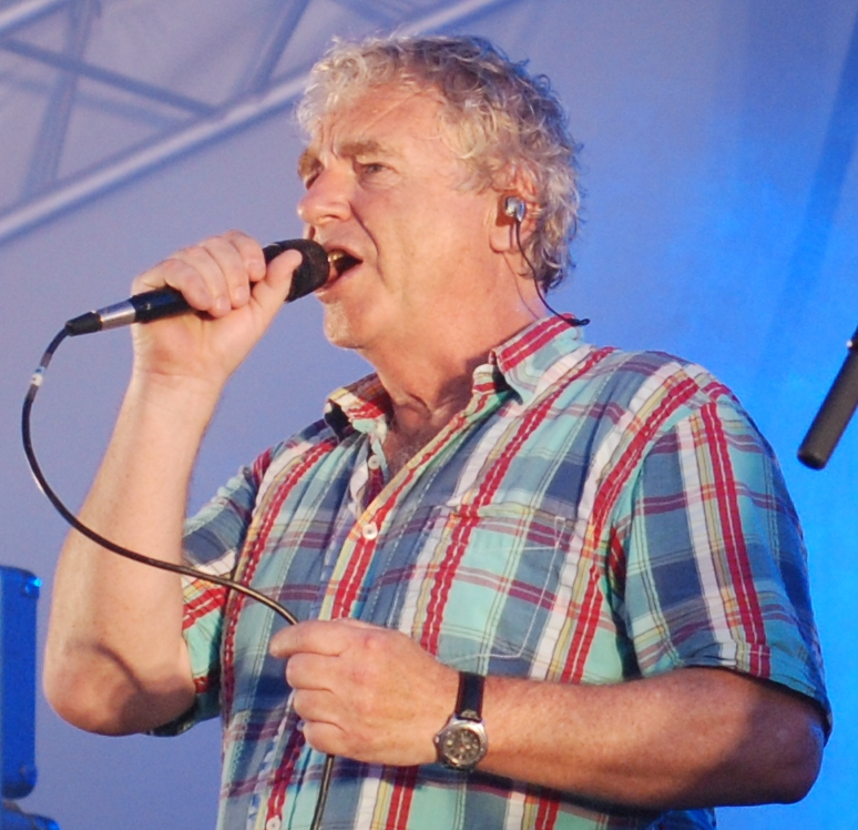 Michael Bundesen i forgrunden for Shu-bi-dua, som gav koncert, mens The Tall Ships Races gæster byen